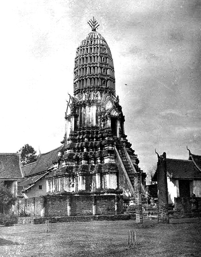 ภาพเก่าองค์พระปรางค์ประธานวัดพระศรีรัตนมหาธาตุวรมหาวิหาร